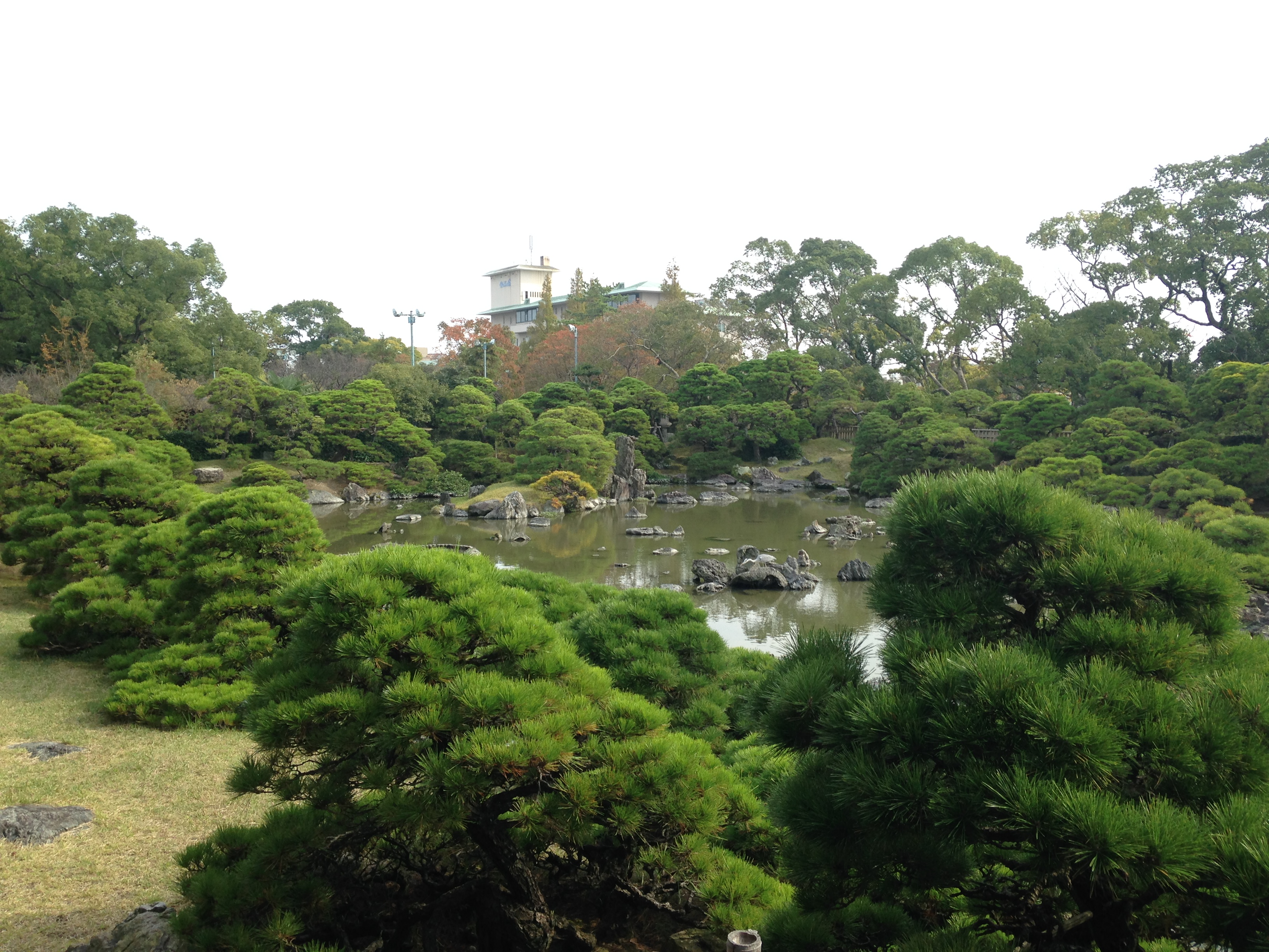 立花氏庭園・松濤園